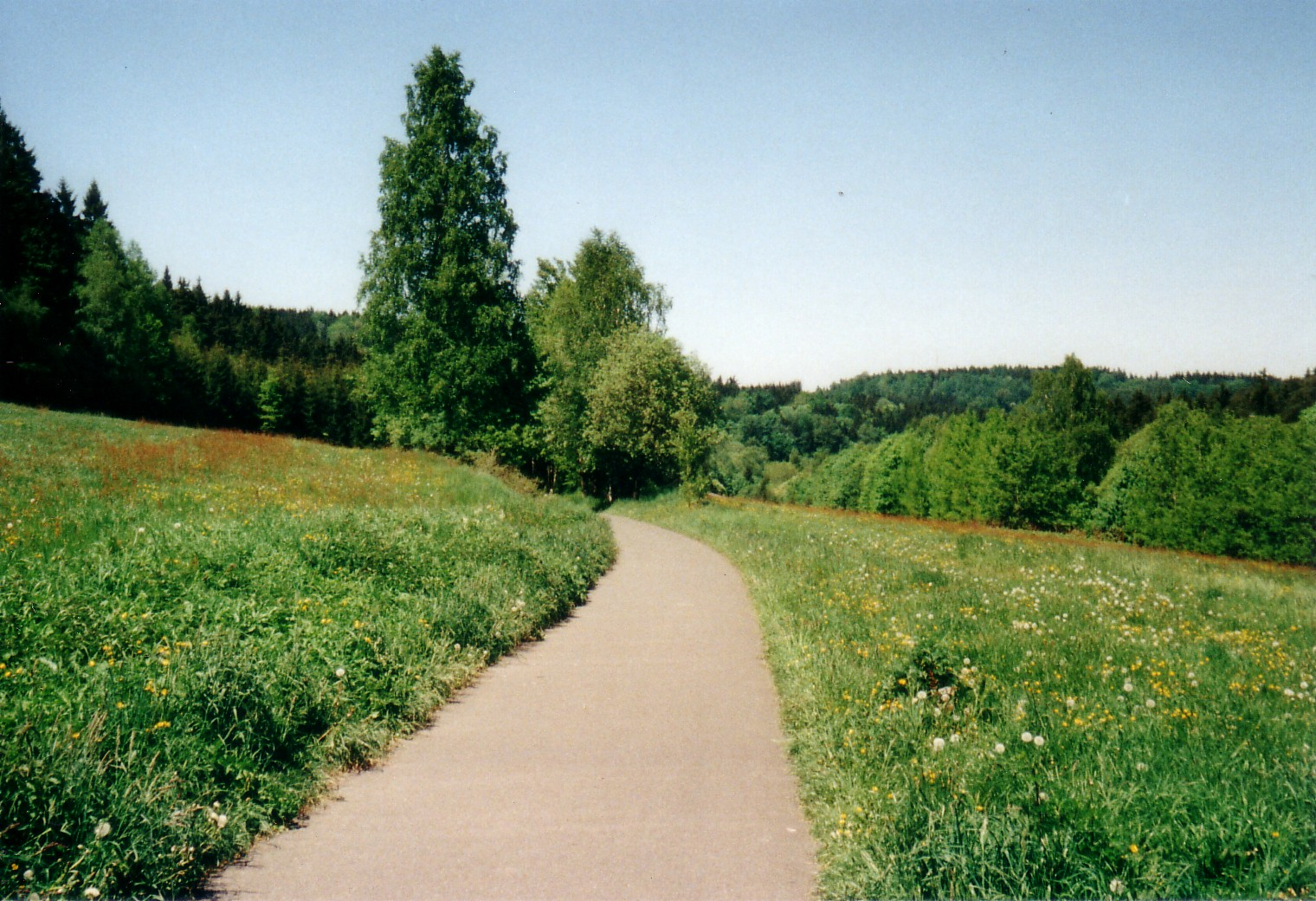 ehem. Bahntrasse zwischen Ehrenfriedersdorf und Thum, asphaltiert und zum Radweg umgewidmet